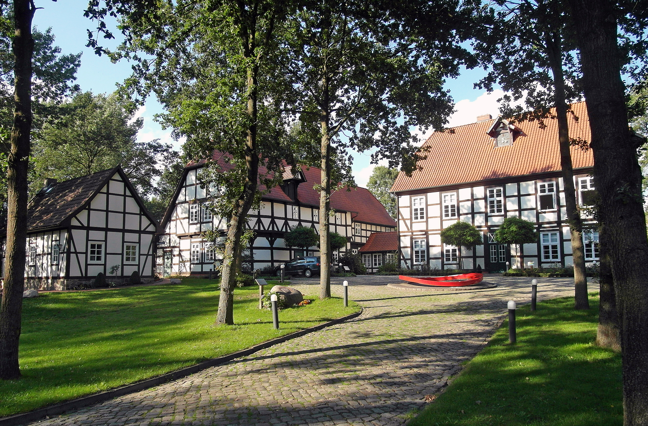 Das Seminar- und Tagungshaus „Die Freudenburg“ entstand 1990 - 93 in den Gebäuden des Amtshauses von ca. 1730 und der Amtsschreiberei aus dem 16. Jahrhundert des ehemaligen Amtes Freudenberg. Die verbliebenen Gebäude stehen innerhalb der historischen Befestigungen (Wall und Graben) des früheren Schlosses Freudenberg, das um 1290 als Vogteifeste der Grafen von Oldenburg-Bruchhausen neben dem hochadligen Damenstift Bassum (gegr. um 860) errichtet worden war.